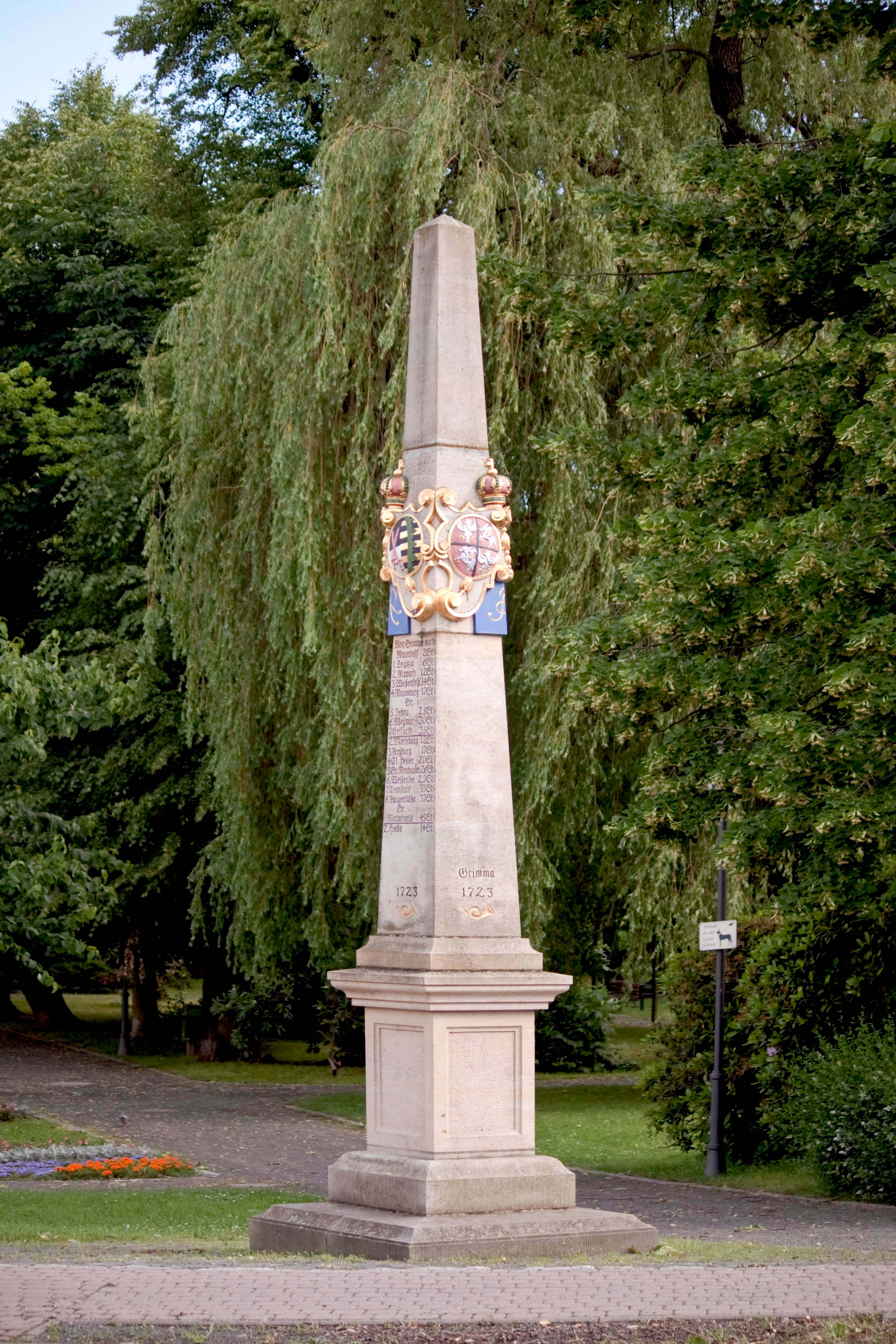 Kursächsische Postmeilensäule-Distanzsäule Grimma, Nachbildung des Originals